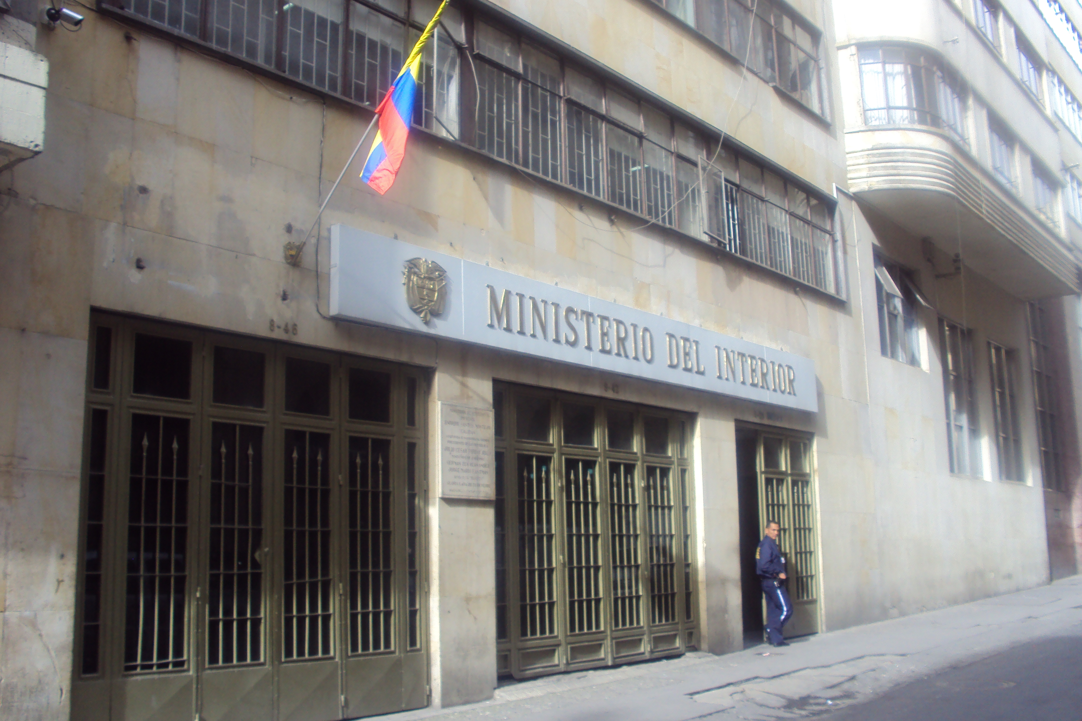 Foto Ministerio del Interior de Colombia